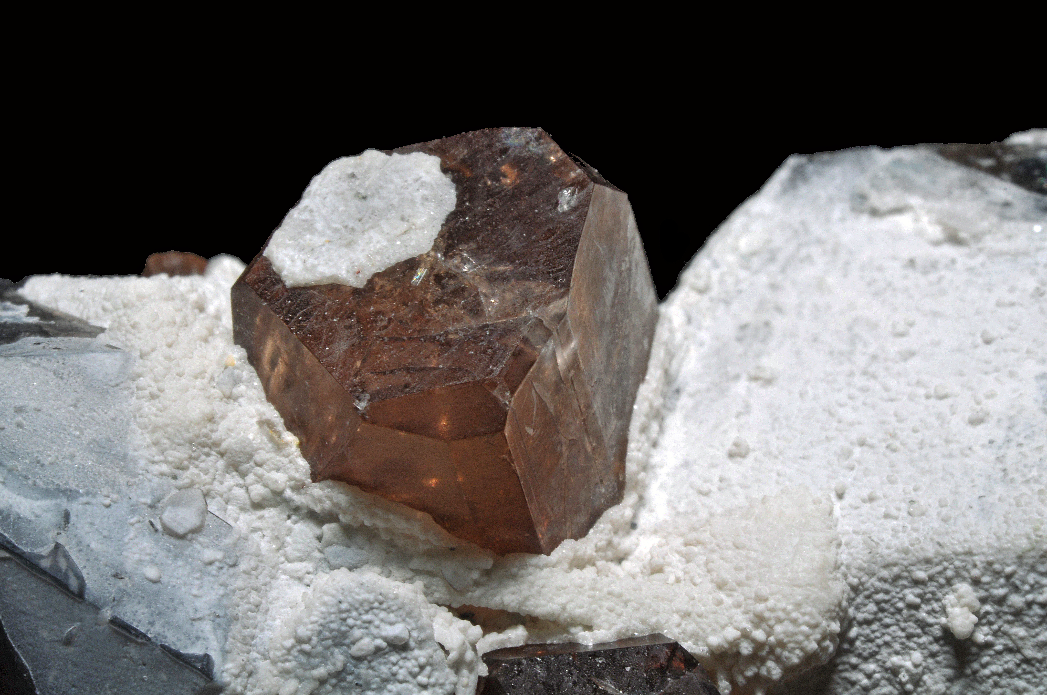 cristal de topaze sur cristaux de quartz fumé - Chamachhu, Haramosh Mounts, Skardu, Baltistan, Pakistan